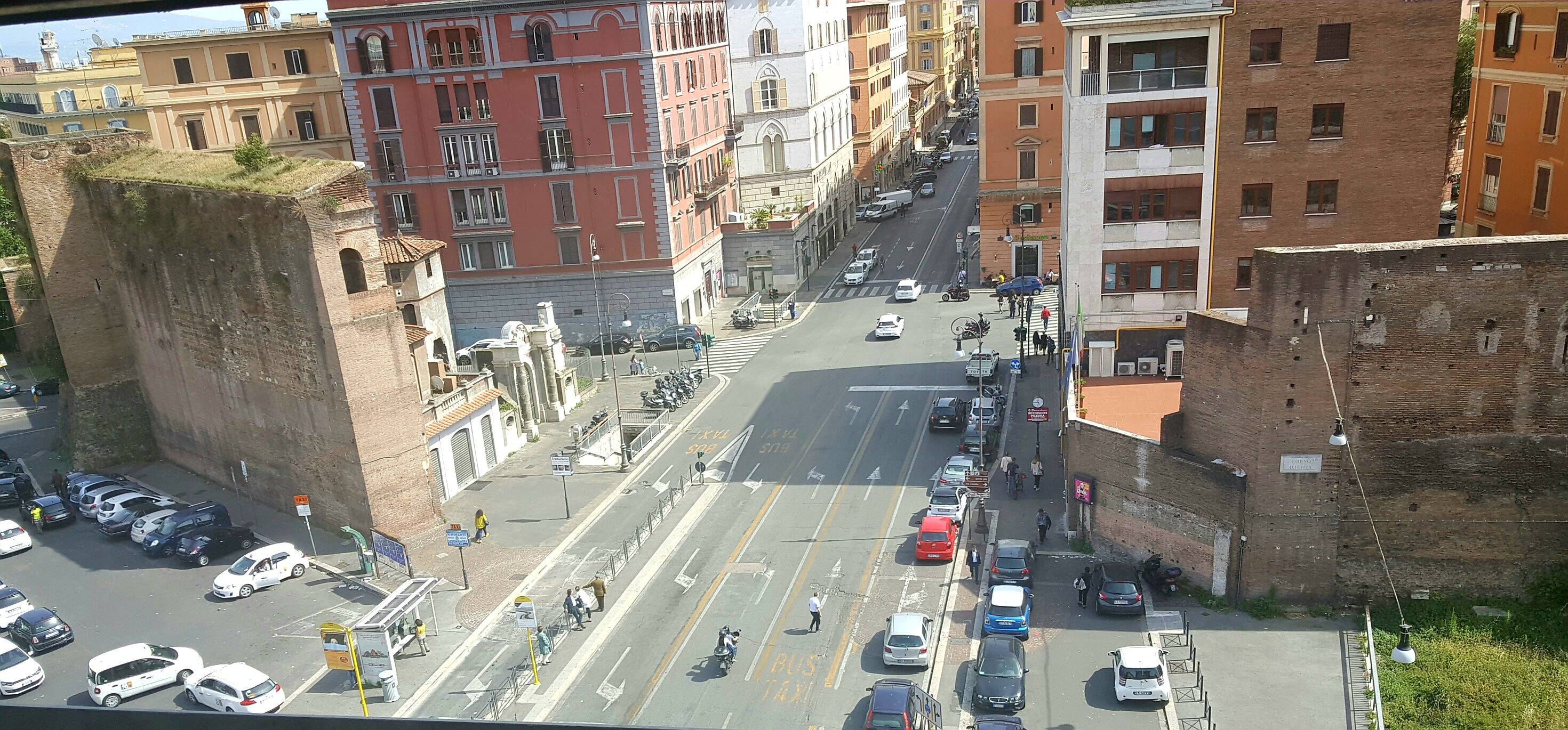 Area dove sorgeva Porta Salaria, vista dall'alto nel 2016